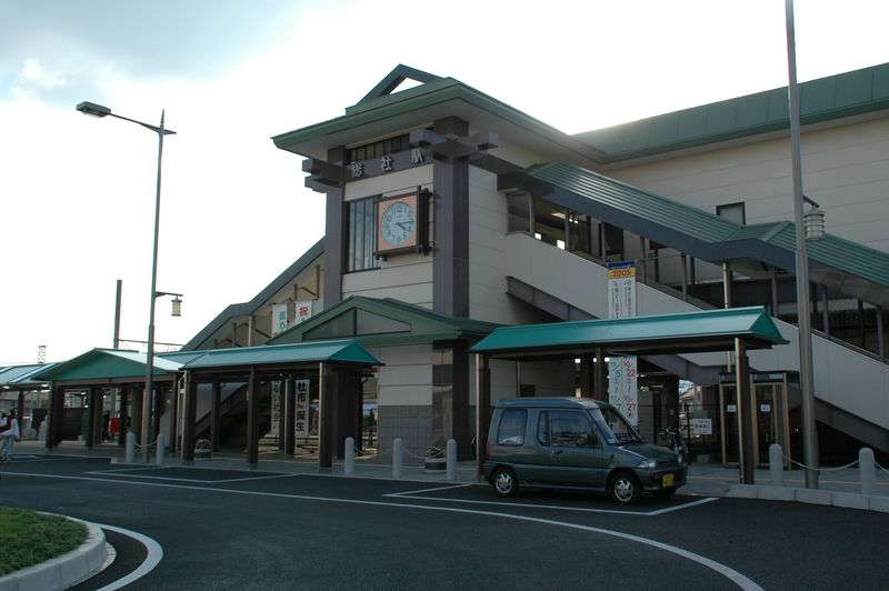 JR-WEST(JAPAN) Hakubi and Kibi Line, Soujya Sta. photo by 2005.10.9